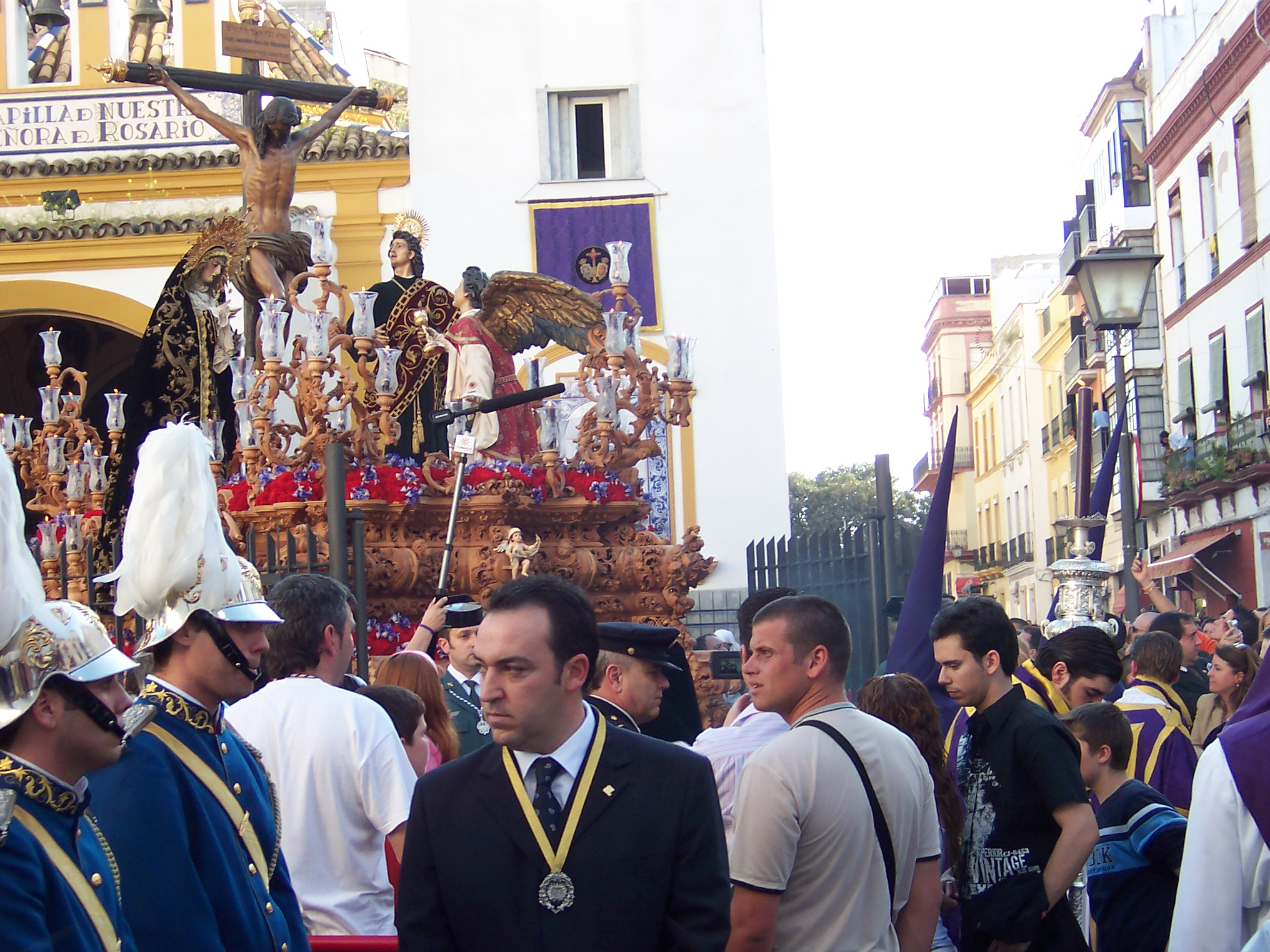 Santísimo Cristo de las Aguas. Semana Santa en Sevilla. Año 2006